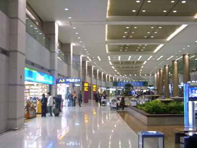 인천국제공항내부